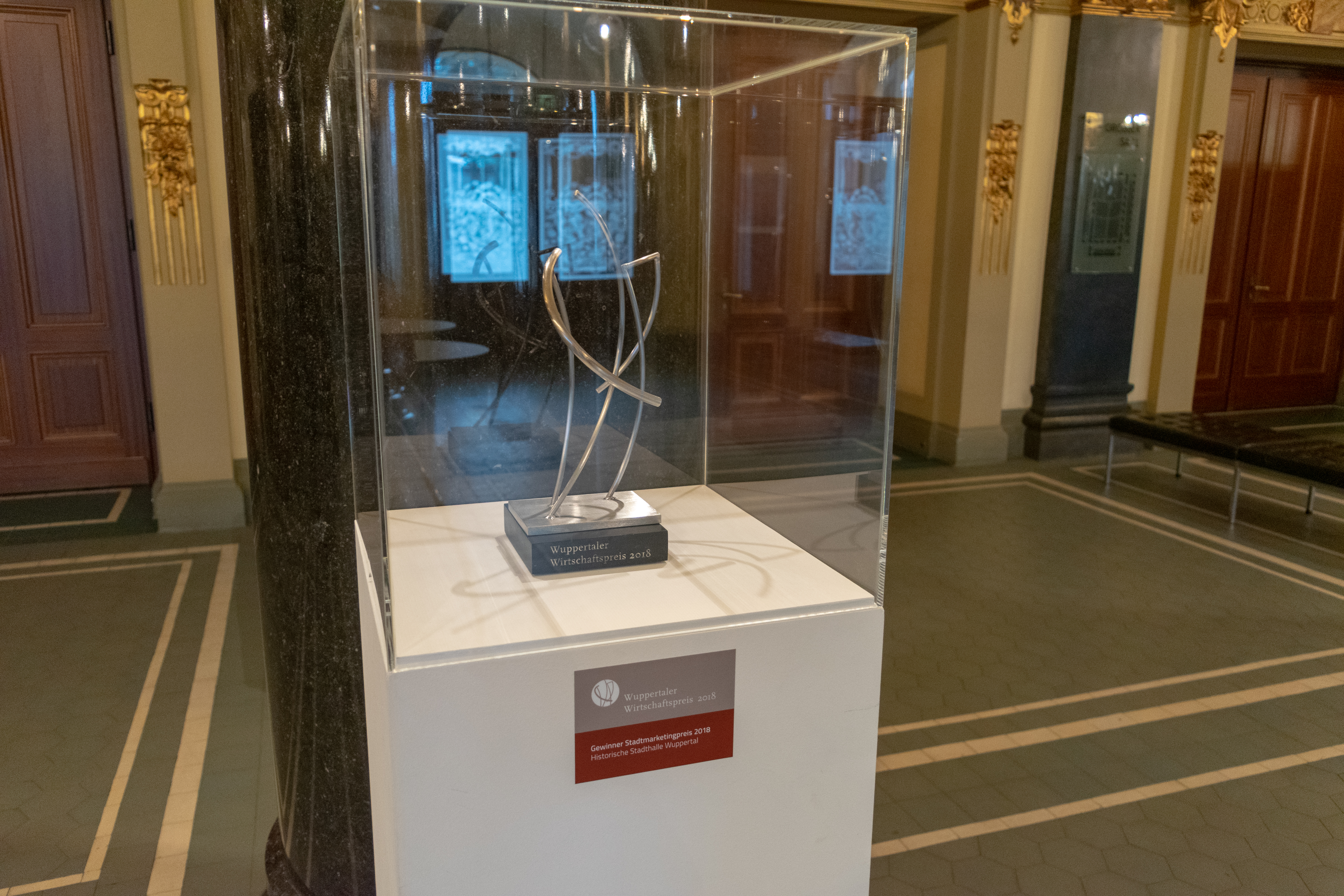 Bahnhofstraße, Wuppertal